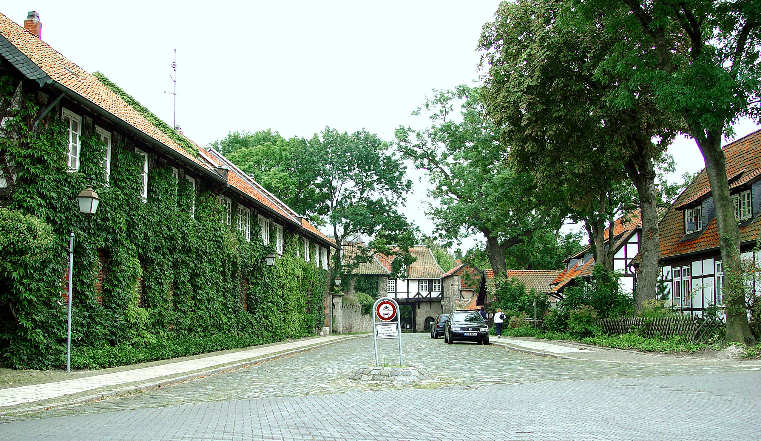 Beschreibung: Riddagshausen, ein Stadtteil Braunschweigs Aufnahmedatum: 14. September 2002 Fotograf: ArtMechanic